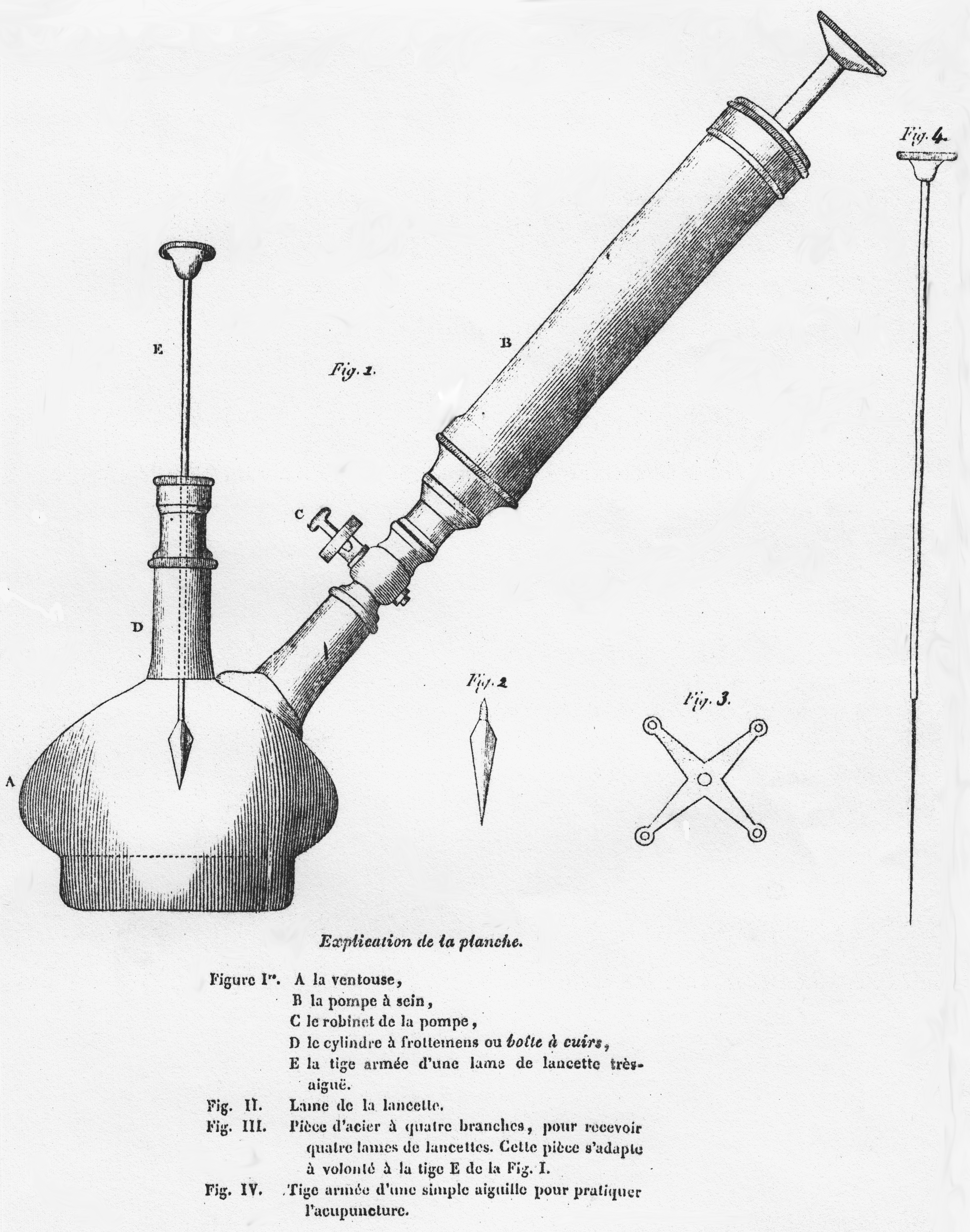 Abbildung eines Schröpfkopfs, dergleichzeitigen Aderlass oder gleichzeitige Akupunktur ermöglicht.